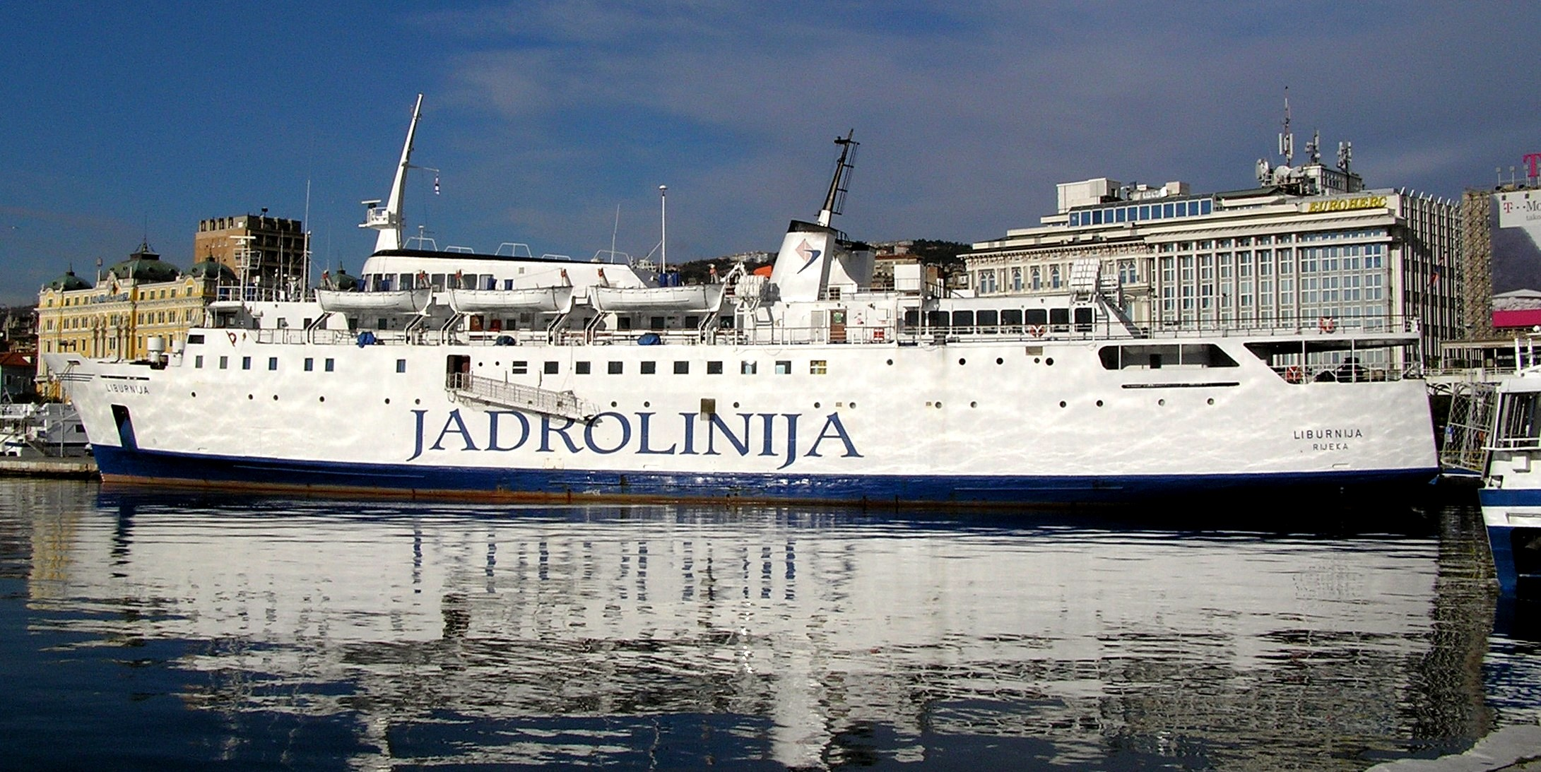 Liburnija ferry of Jadrolinija in Rijeka, Croatia